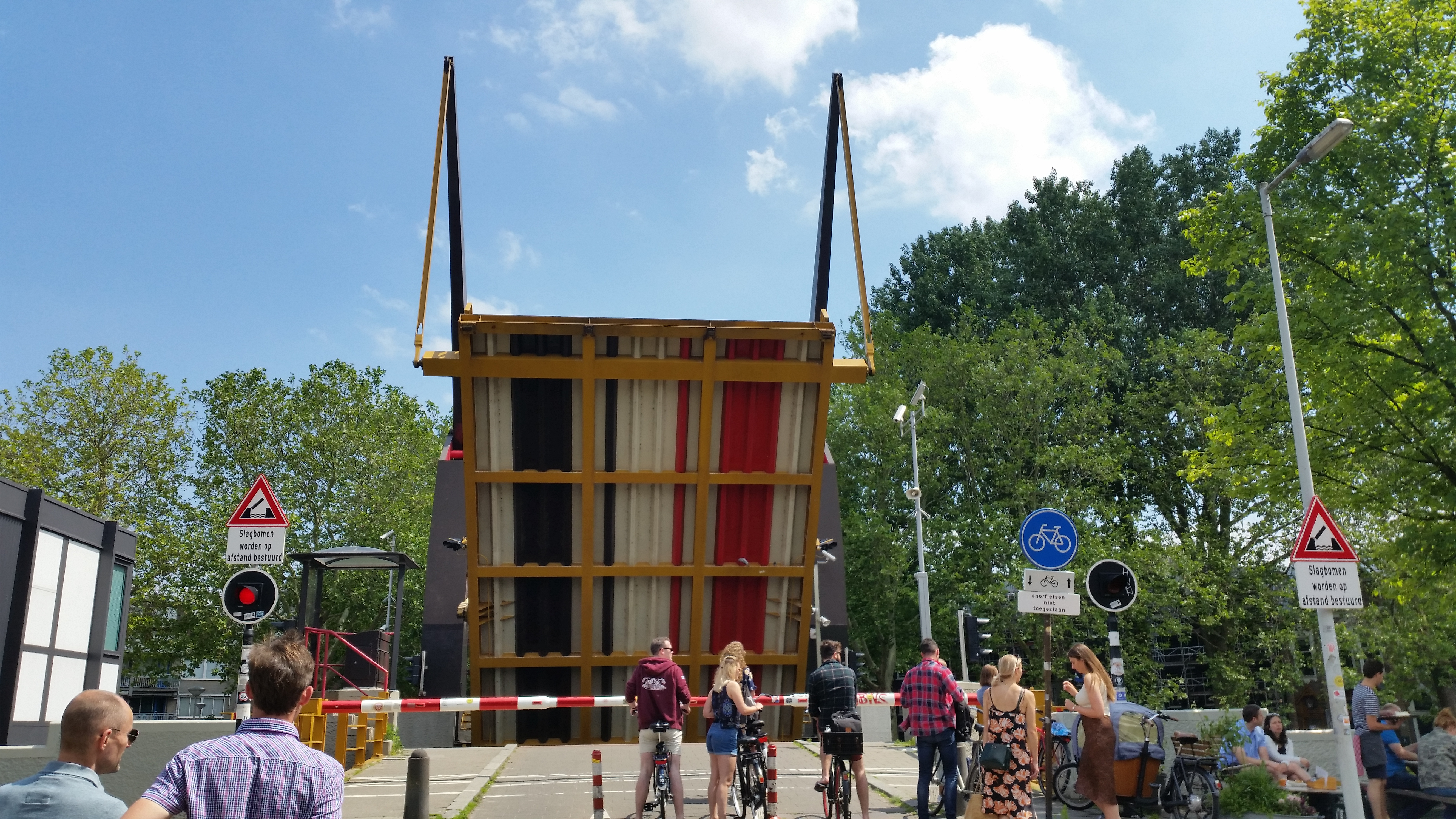 Kleurrijke val aan de onderzijde van Brug 360, Théophile de Bock